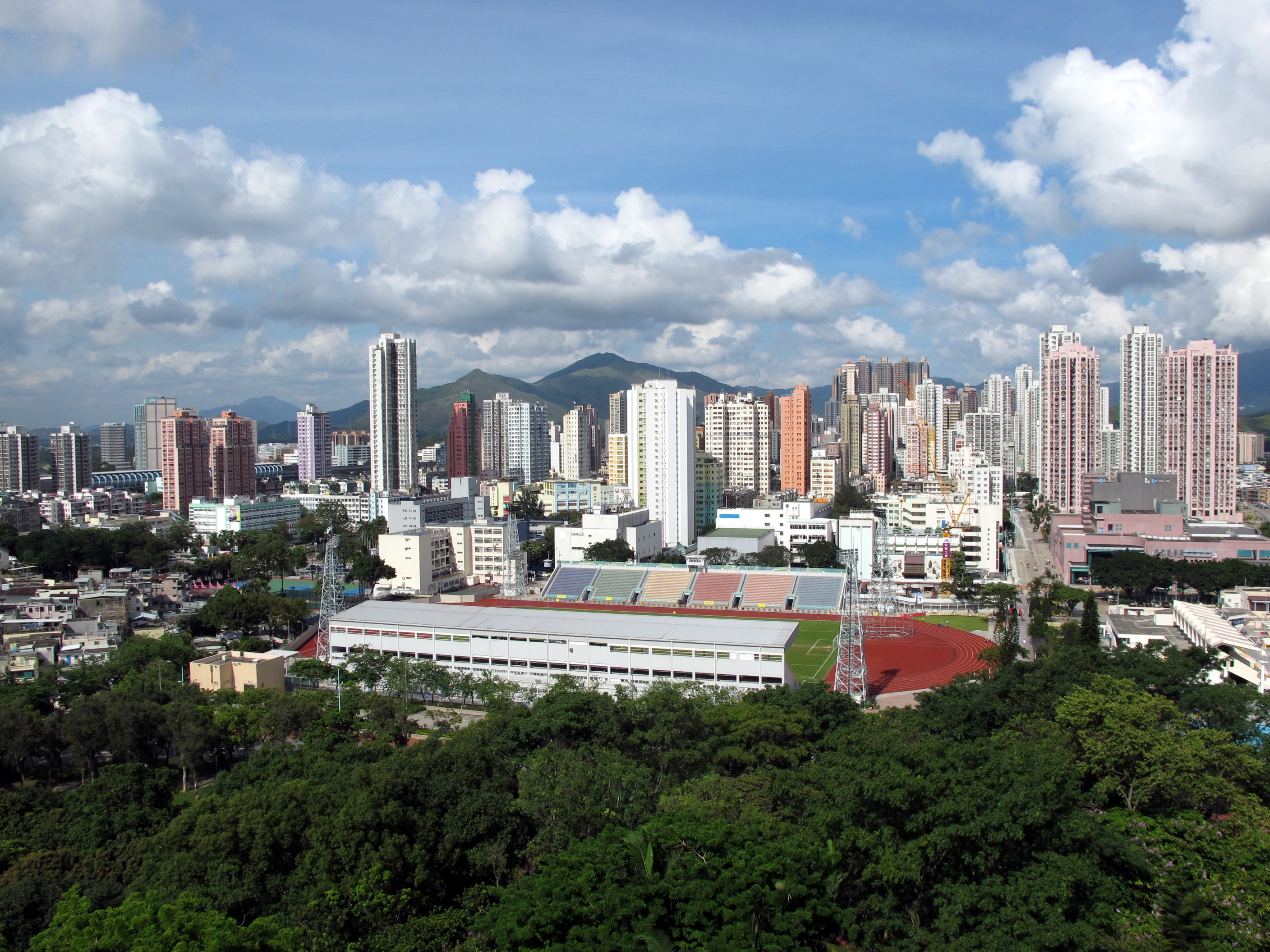 Yuen Long Skyline